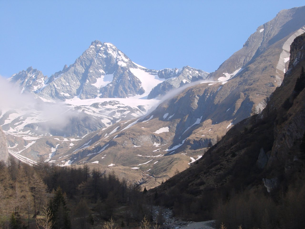 Grossglockner, photo by Tomasz Muszer